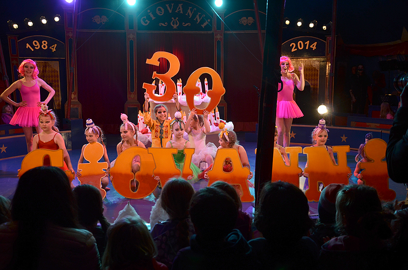 Eröffnungsbild der Jubiläumstour 2014 vom Kinderzirkus Giovanni anlässlich der Gründung im Jahr 1984, gesehen im Zirkuszelt neben dem Neuen Rathaus in Hannover, wo der Kinderzirkus täglich vom 29. Mai bis 1. Juni 2014 Vorstellungen angekündigt hat ...